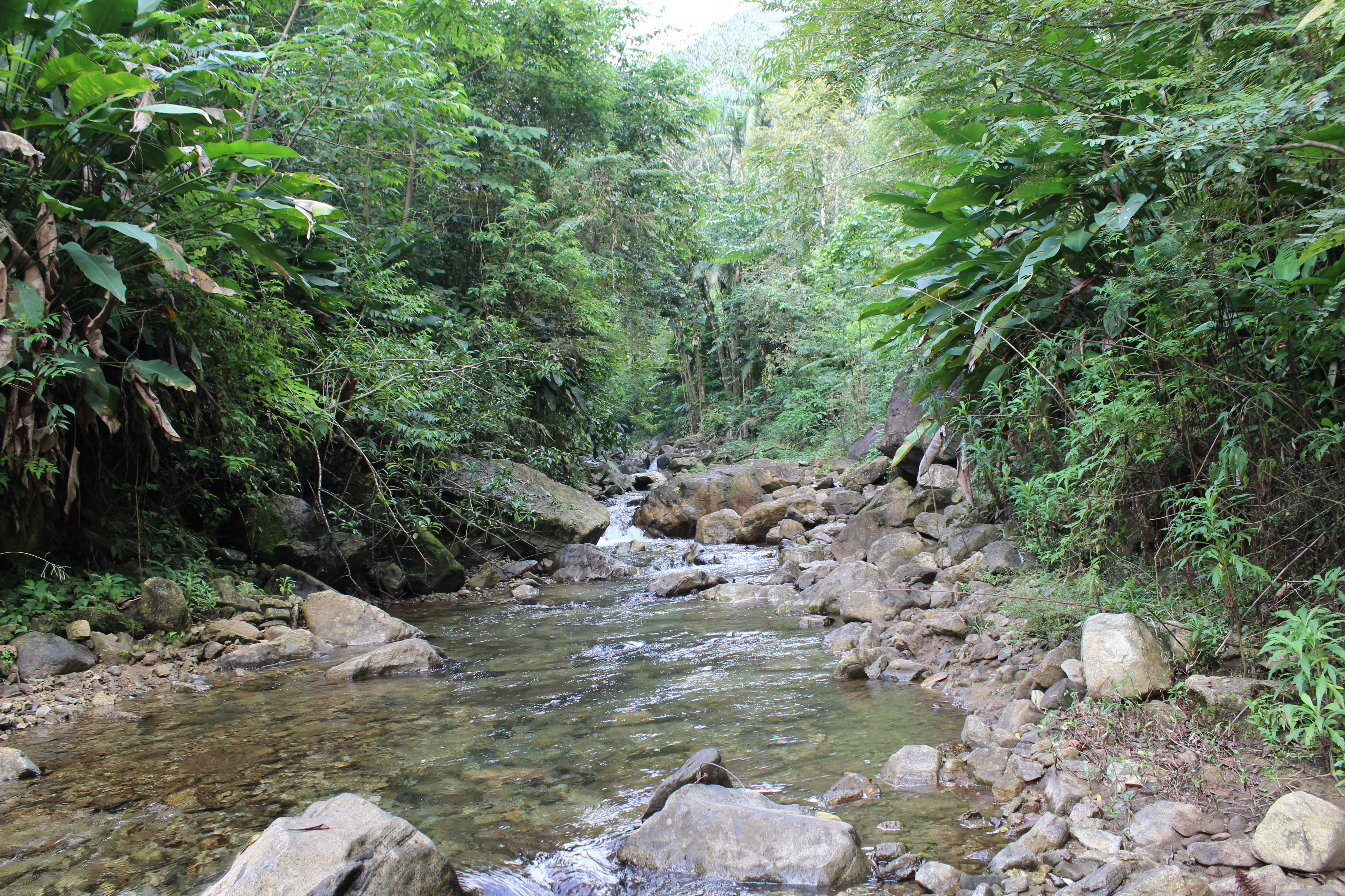 Schroeder - Santa Catarina